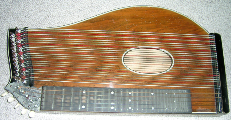 Zither (Konzertzither) quote from caption on Zither: "alpenländische Zither in Salzburger Form"